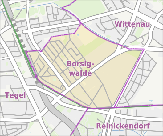 Übersichtskarte der Straßen und Ortslagen in Berlin-Borsigwalde